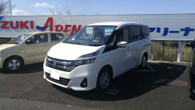 スズキランディ